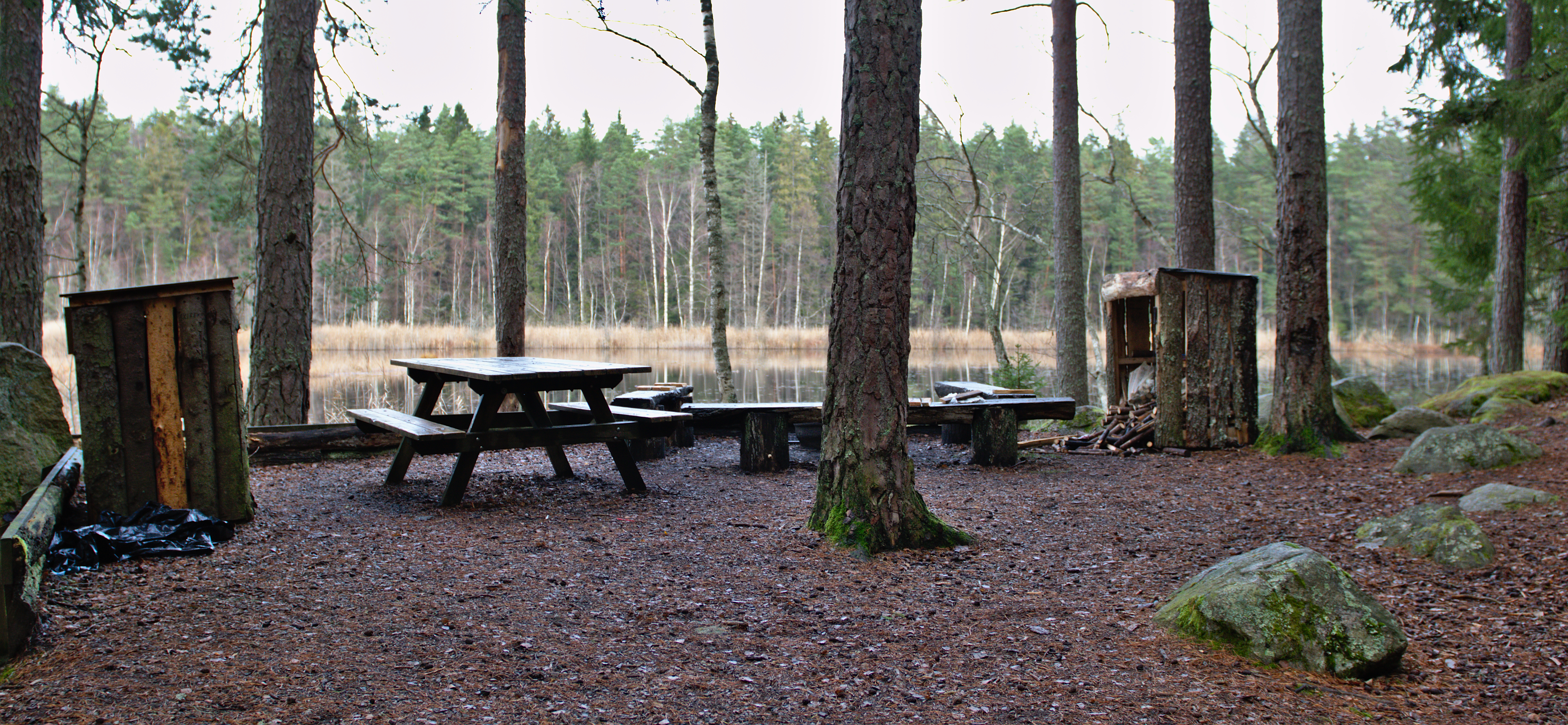 Naturreservatet Skiren-Kvicken i Eskilstuna kommun. Grillplats vid sjön Skiren.